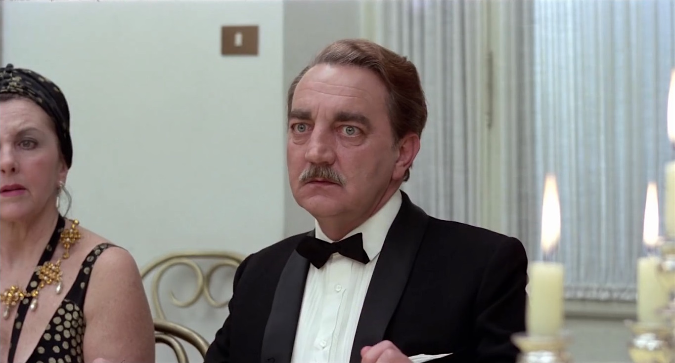 Ugo Bologna -Screenshot di Il secondo tragico Fantozzi film del 1976 diretto da Luciano Salce